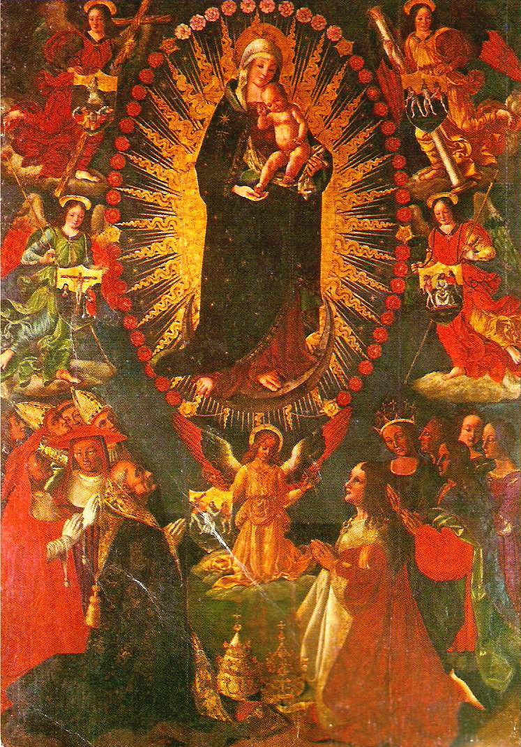 il capolavoro.